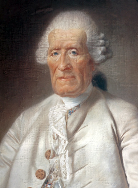 Portrait de Vaucanson mentionné dès 1782.